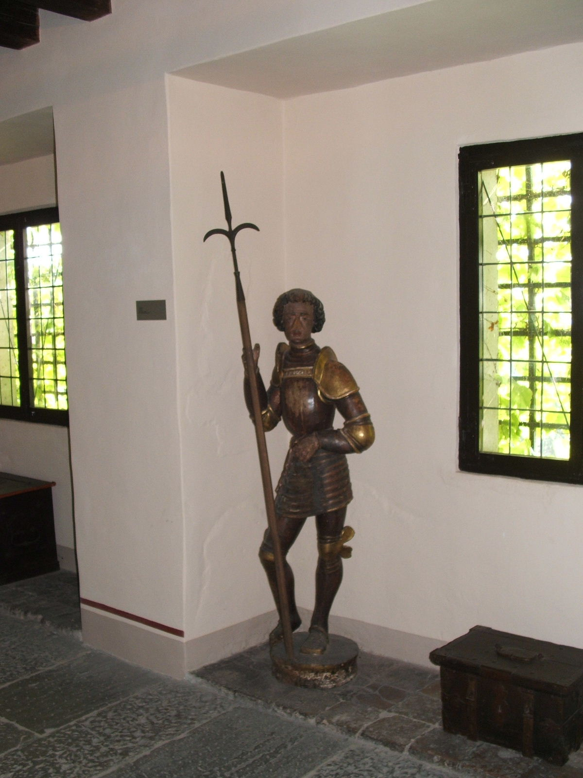 Immagine da Trieste - Castello di San Giusto. Statua raffigurante San Sergio.